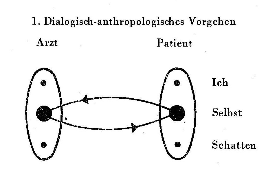 Aus: Hans Trüb: Heilung aus der Begegnung. Suttgart 1951, 44.